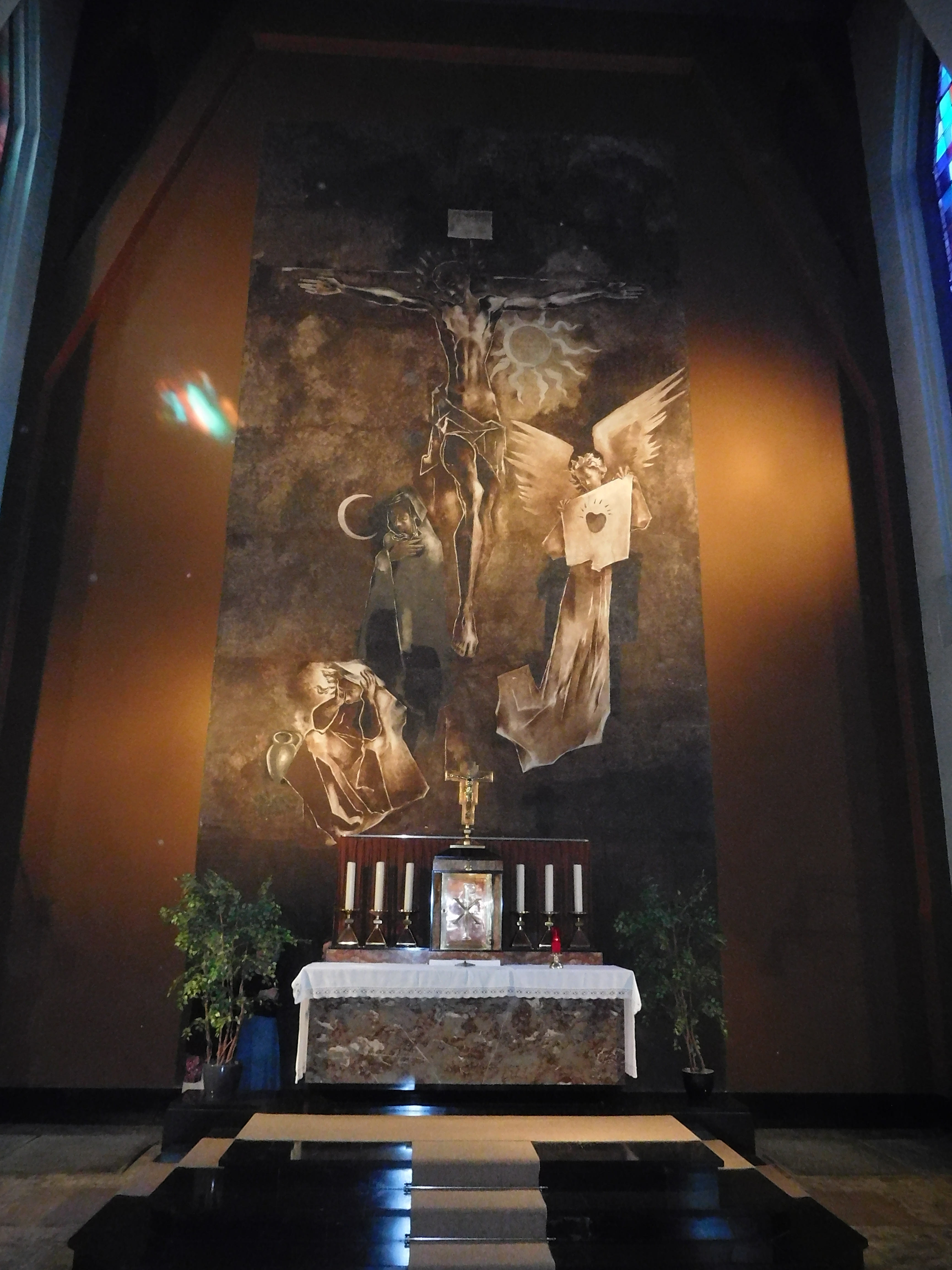 Crucifixion du Christ: fresque de Marie-Alain Couturier dans l’église du Sacre-Cœur, à Saint-Servais (Namur), en Belgique